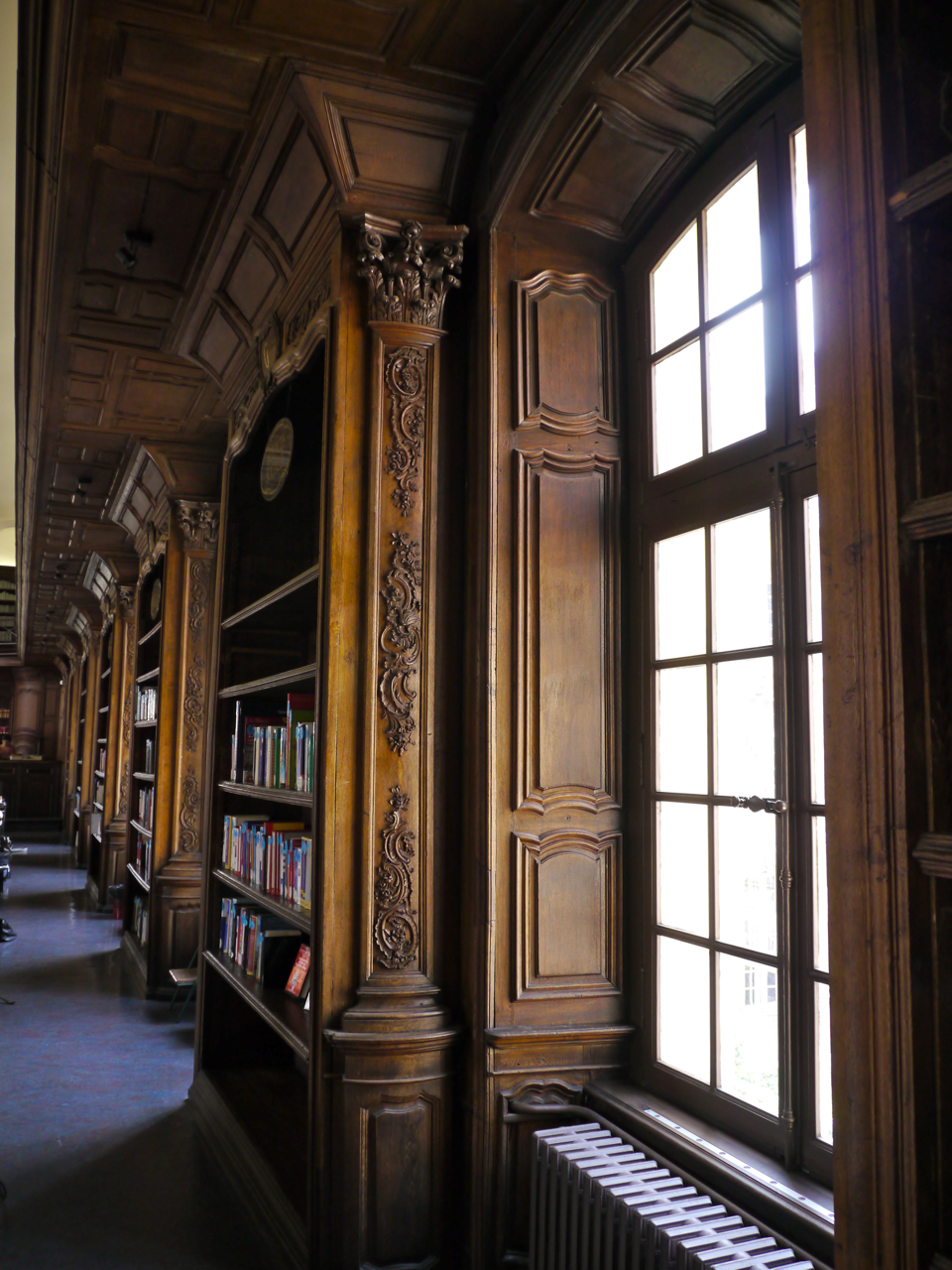 Boiseries classées de la Bibliothèque Municipale de Nancy, provenant de l'Université de Pont-à-Mousson.